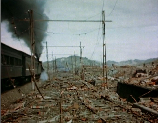 原爆の被害から復旧した長崎本線